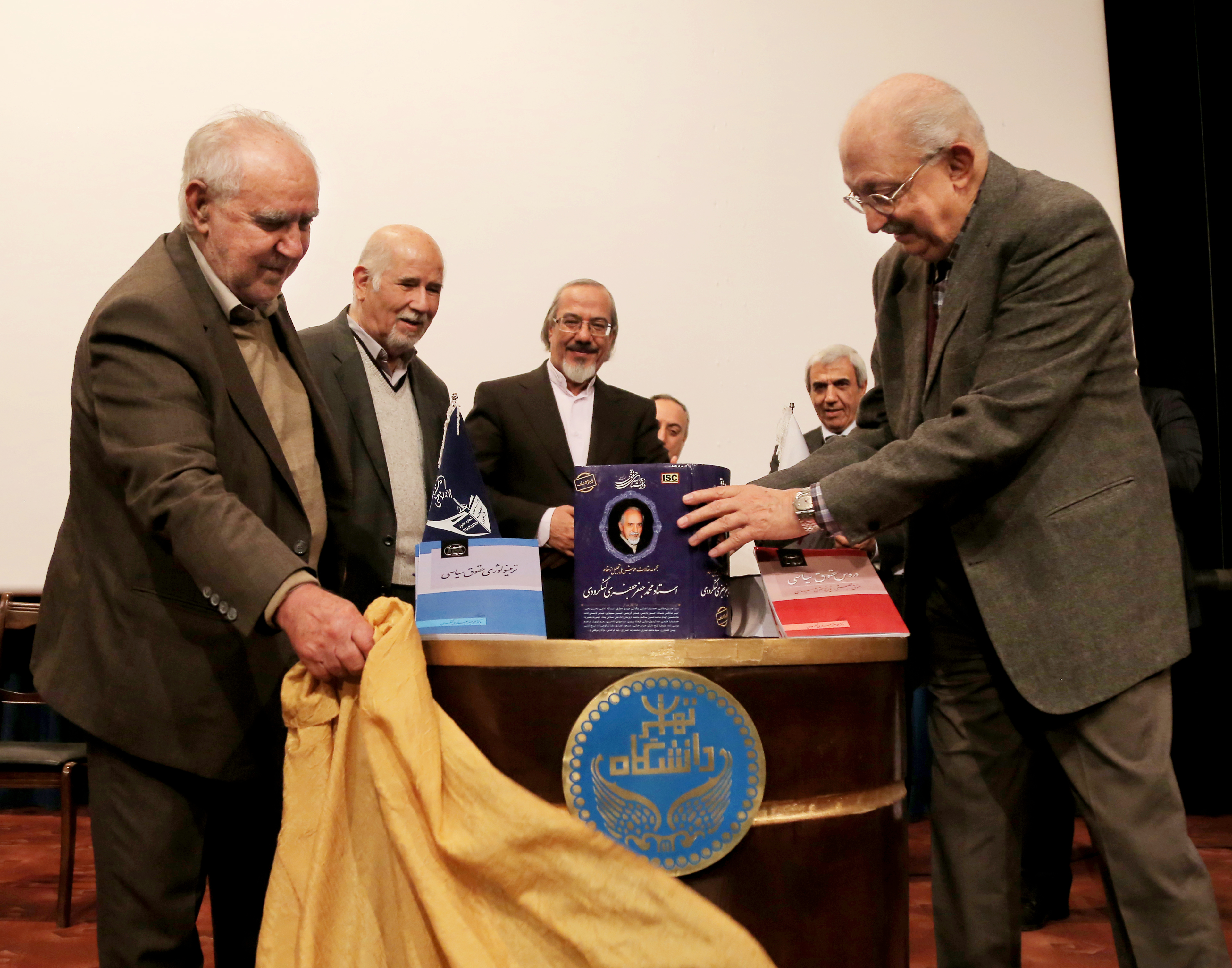 رونمایی از مجموعه مقالات اهدایی به محمدجعفر جعفری لنگرودی